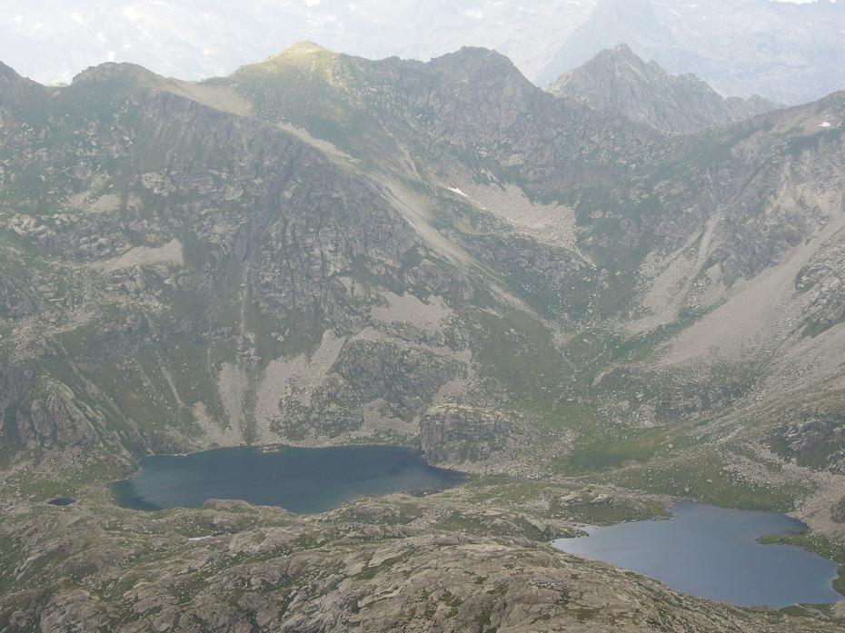 Estanys de Castieso i Morto, i Pala de Cubieso, vistos des del Pic de Tort; la Torre de Cabdella ,Pallars Jussà, Catalunya